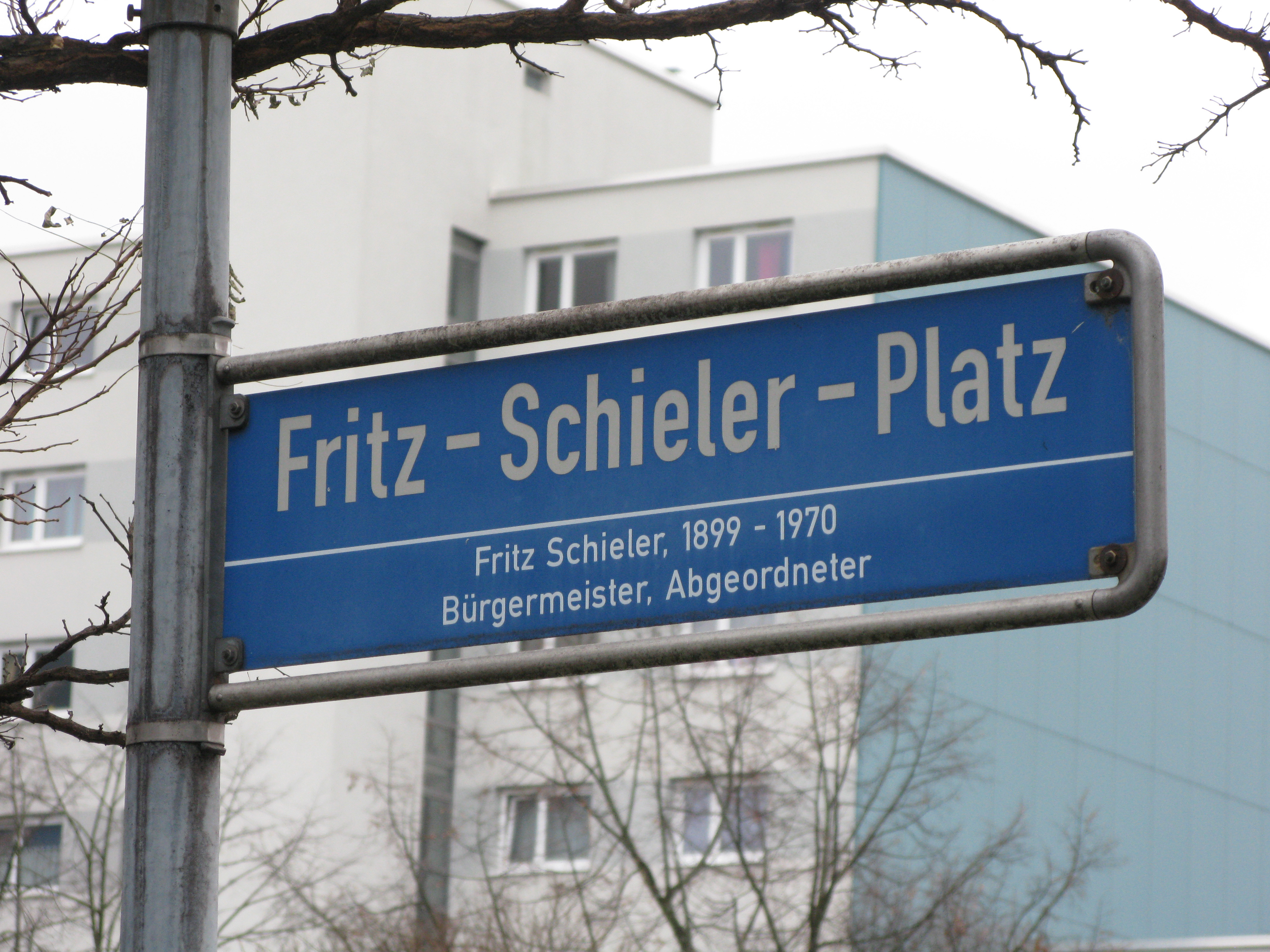 Straßenschild in Freiburg